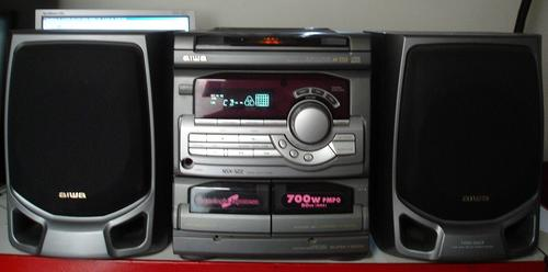 Exemplo de aparelho de som.